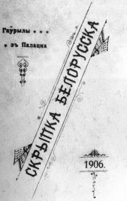 Алаіза Пашкевіч, "Скрыпка беларуская". Вокладка.